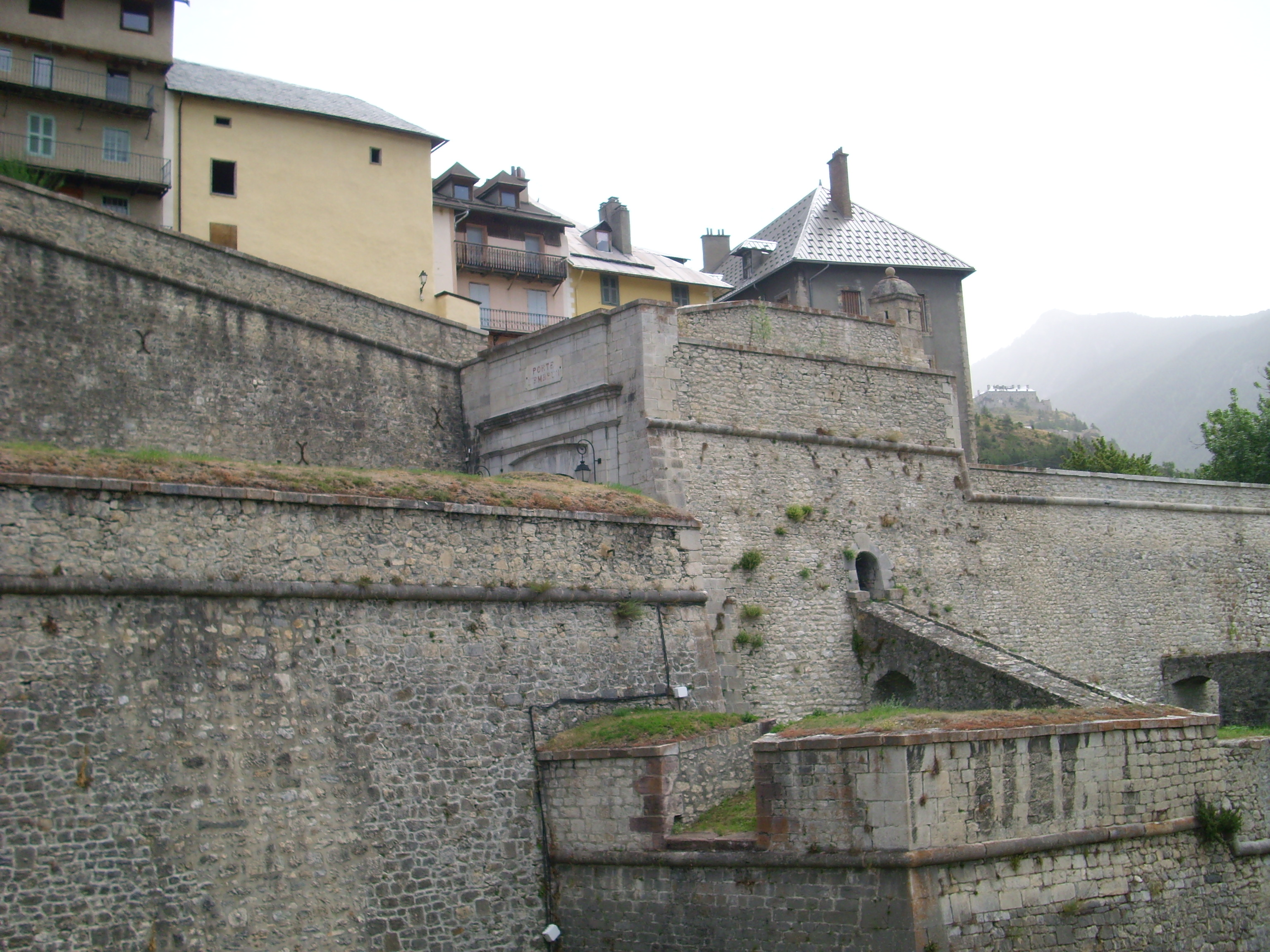 La cittadina di Briançon, Francia